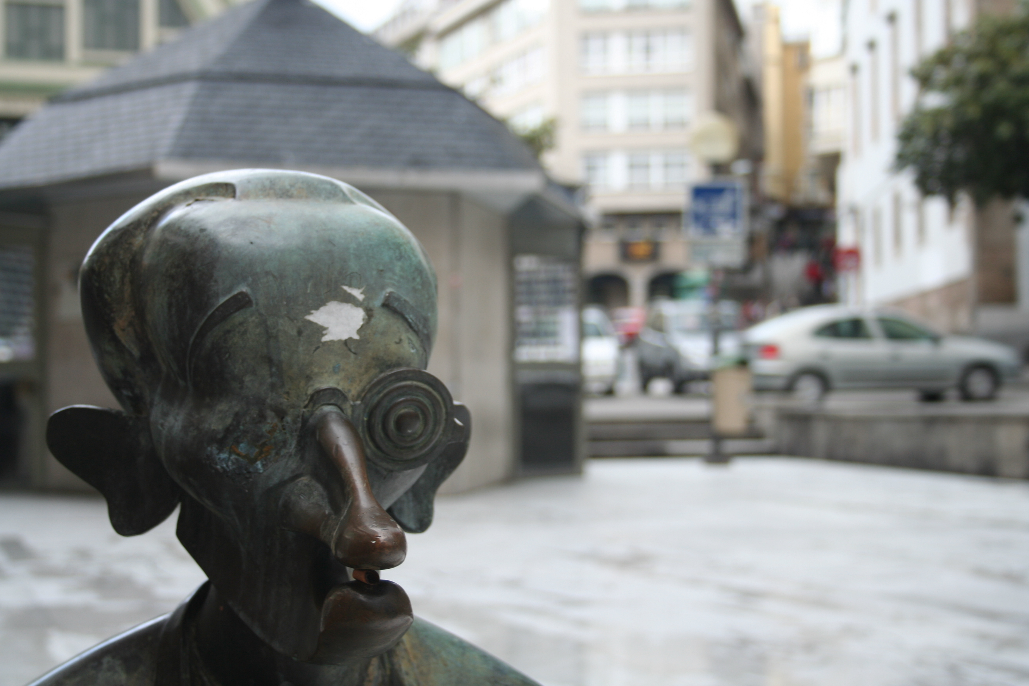 Busto de Vicente Risco na praza do Humor (A Coruña).